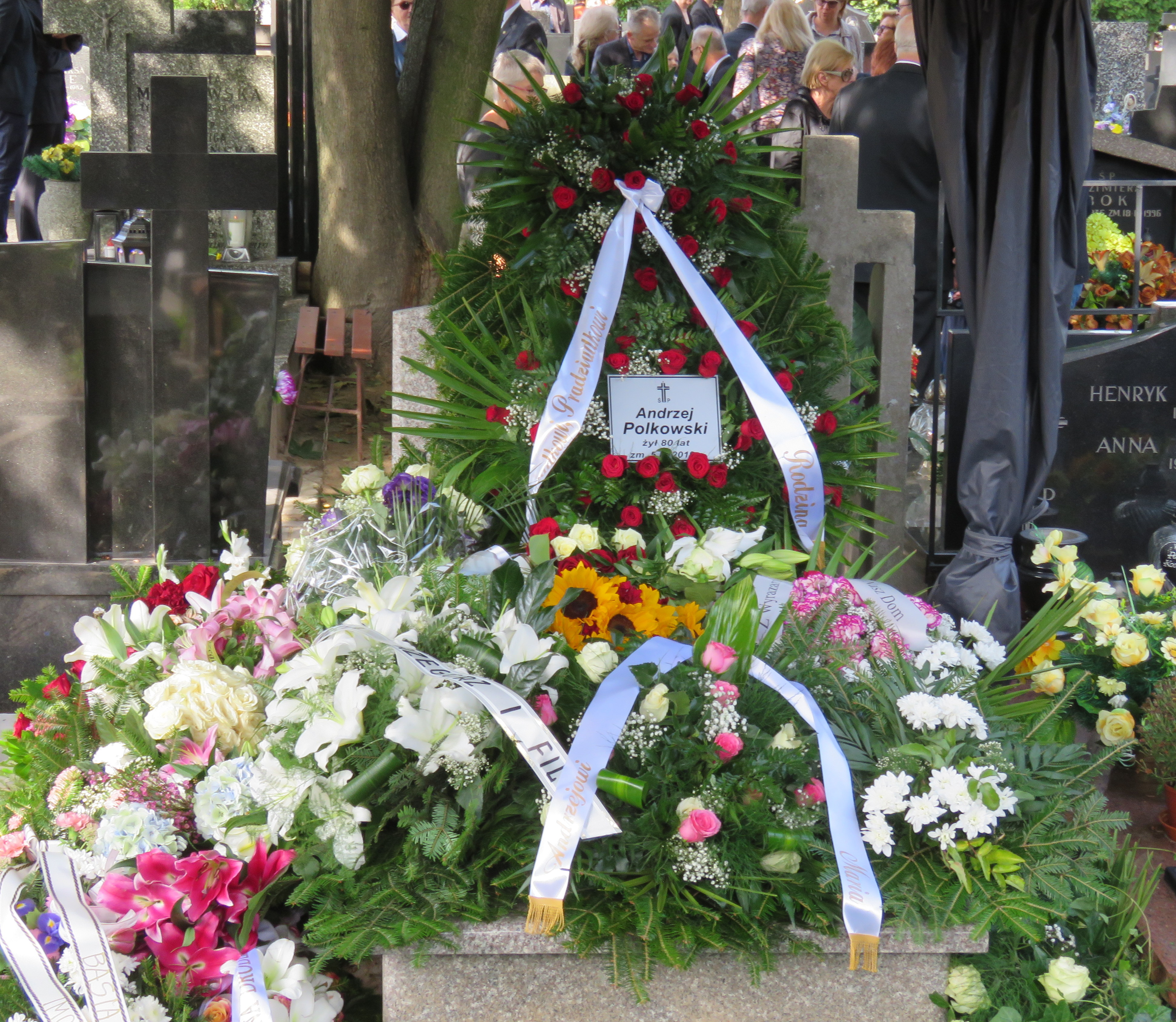 Andrzej Polkowski’s grave. Andrzej Polkowski (b. September 5, 1939, d. September 5, 2019) - Polish translator (Harry Potter). He lived in Warsaw and Górki, Poland